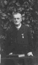 Václav Oplt (1847 - 1935), Český římskokatolický kněz.